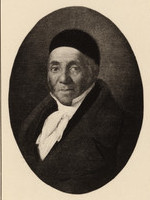 Brustbild nach halblinks im Oval mit gedr. Beschriftung: "Joseph Baer / Der Gründer der Firma / geb. 4. Dec. 1767. - gest. 9. Jan. 1851."